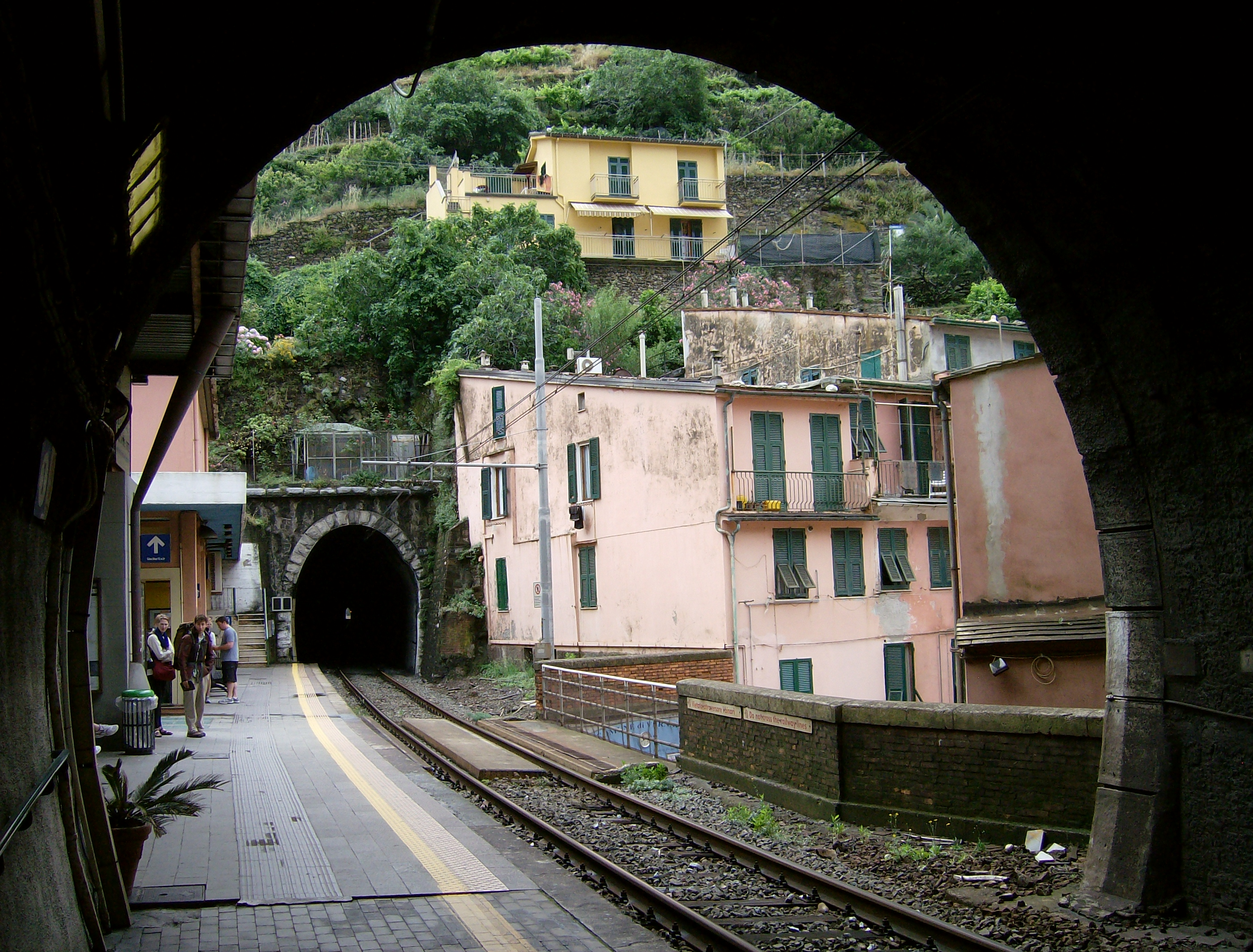 Stanice Vernazza, Itálie